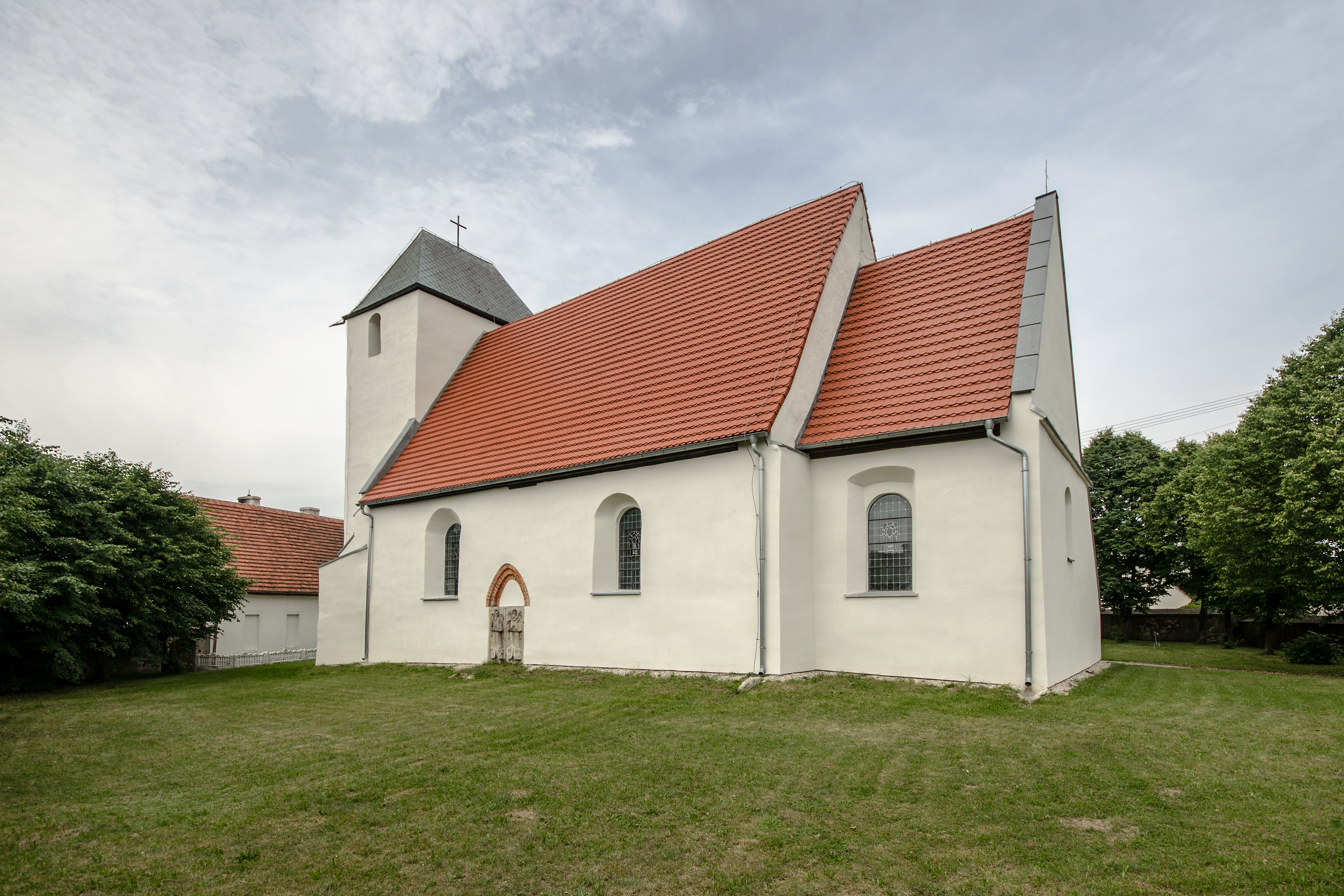 Miodnica, kościół par. p.w. św. Sebastiana, 1 poł. XIV, 1668